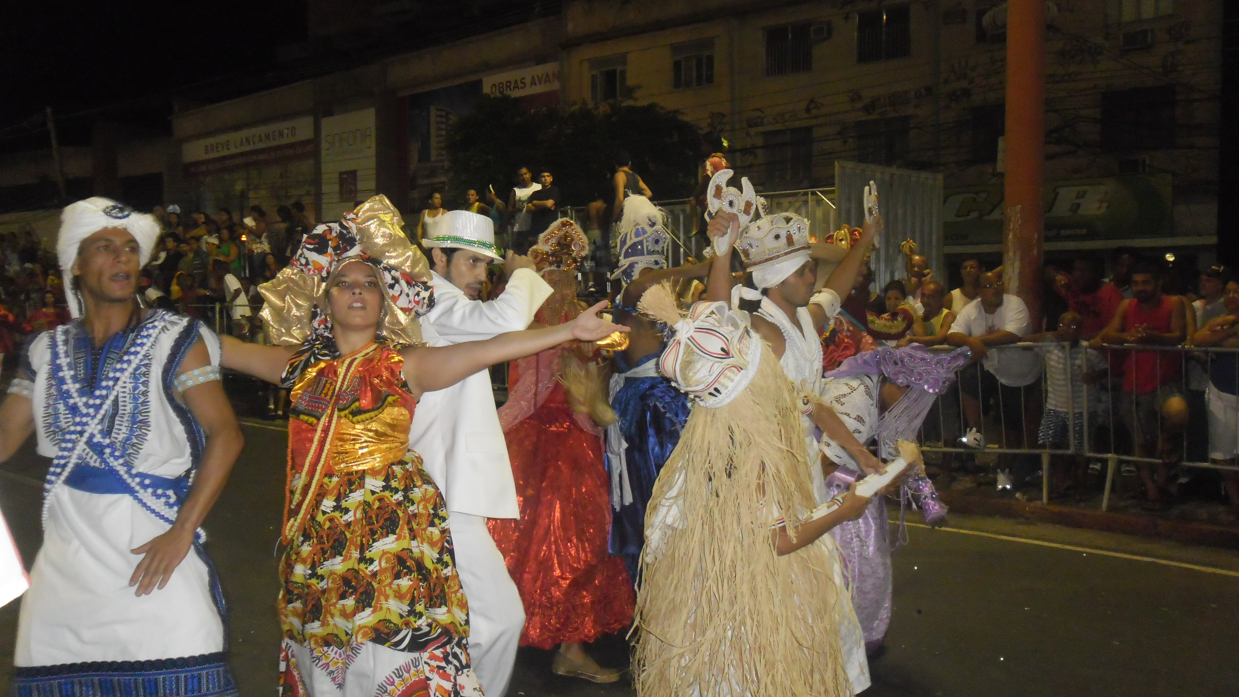 Leão de Nova Iguaçu, Carnaval 2013.